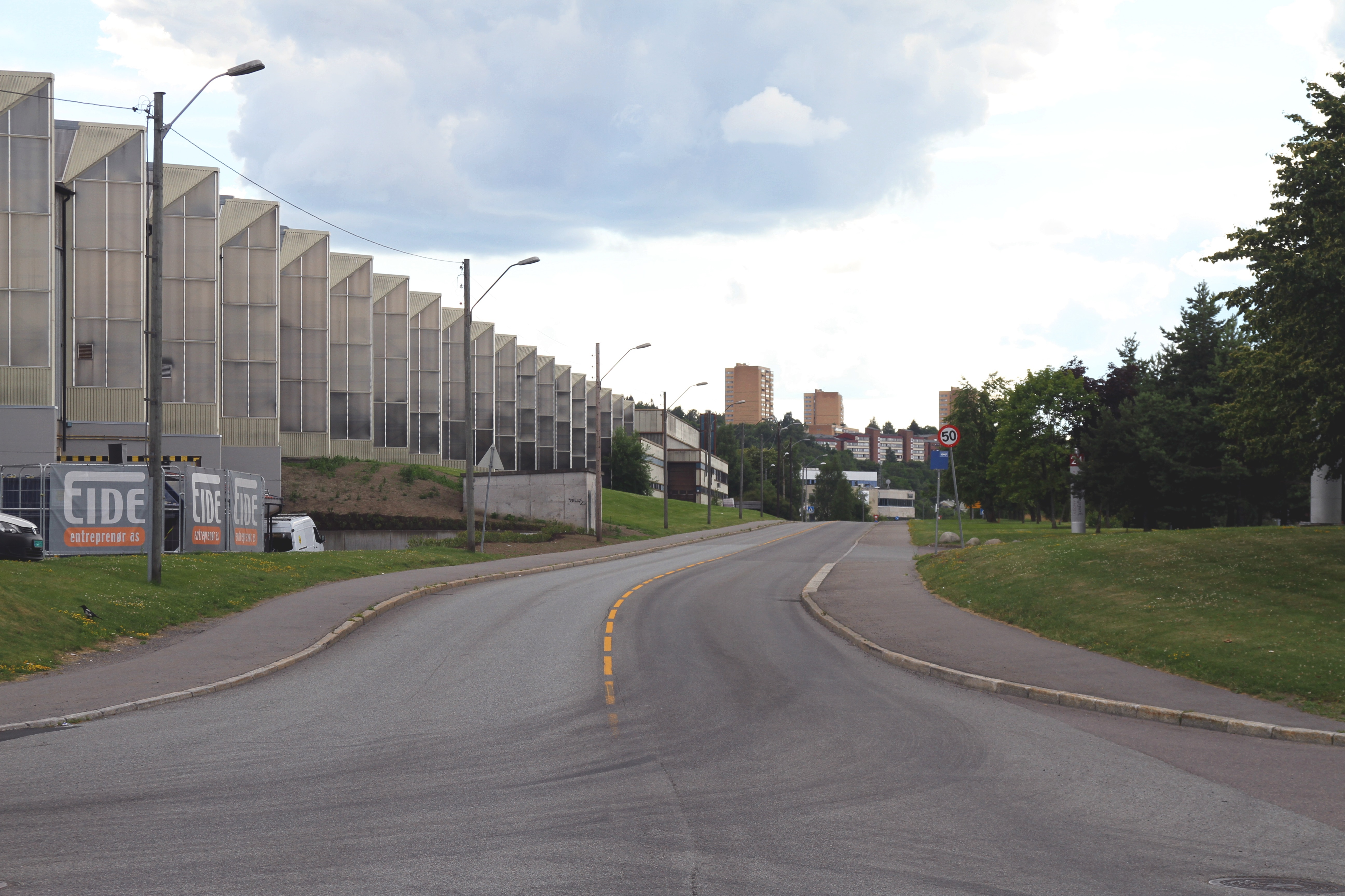 Professor Birkelands vei i Oslo.